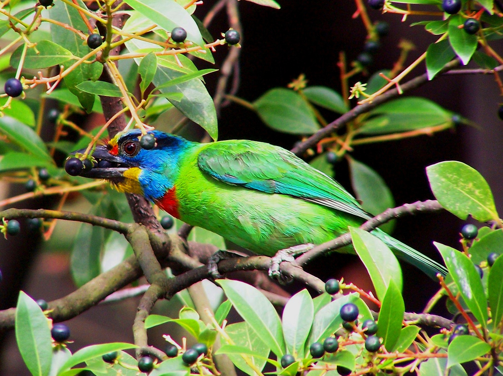 Megalaima oorti oiseau formose